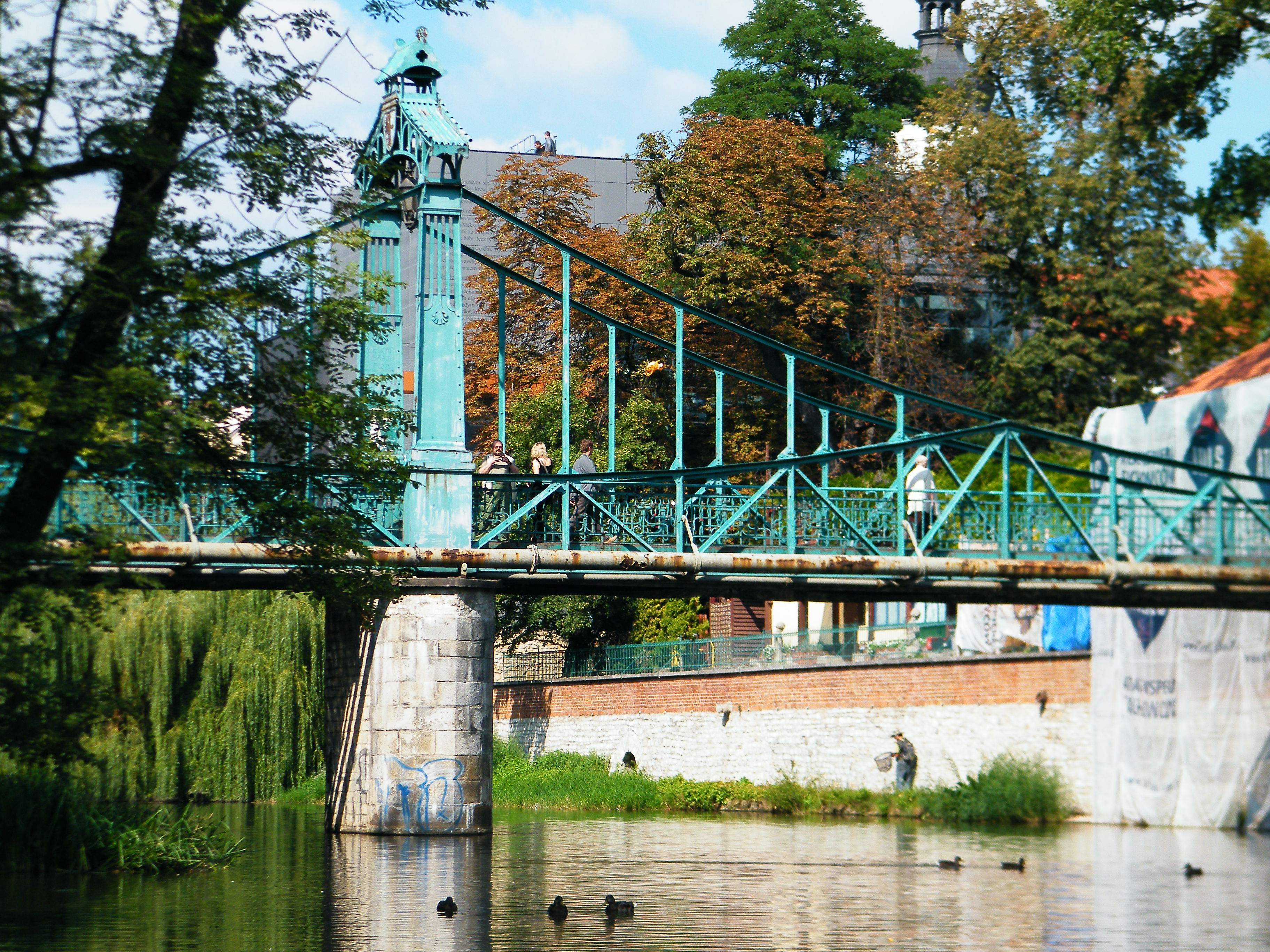 Most dla pieszych na kanale Młynówka, mur., pocz. XX Opole, ul. Piastowska - Mozarta, Opole 12.1992.